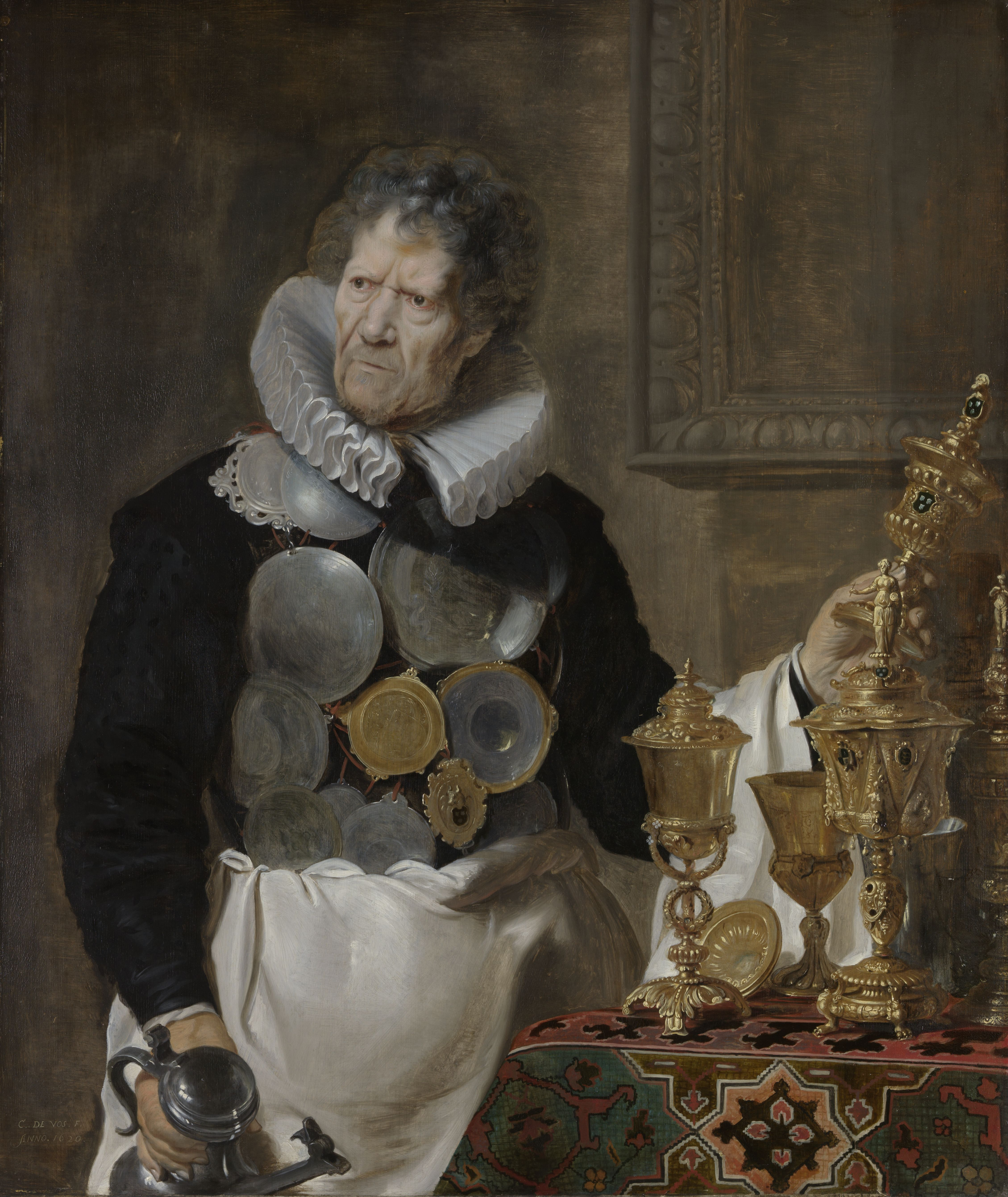 schilderij ( Cornelis de Vos( koninklijk museum voor schone kunsten antwerpen